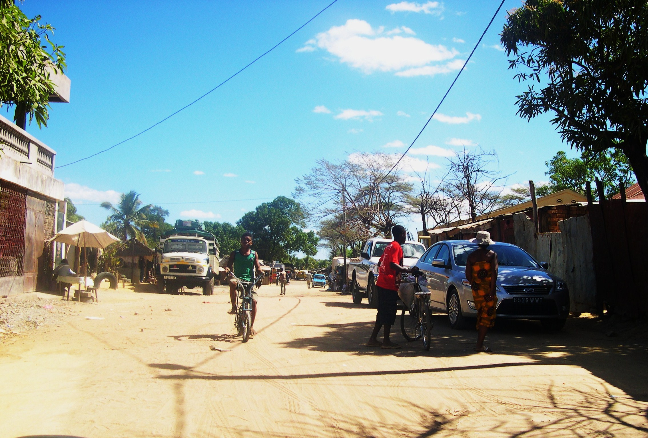 Chemin de terre dans les faubourgs d'Ambilobe